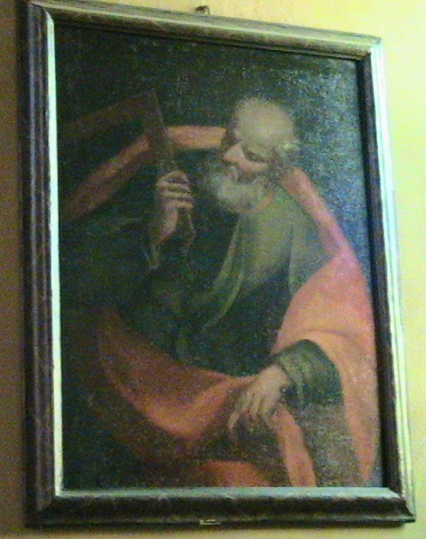 Rivarolo Mantovano - Chiesa parrocchiale di Santa Maria Annunciata - San Giuseppe opera di Marco Antonio Ghislina di Casalmaggiore